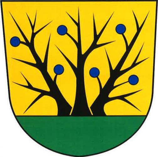 Trnávka (okres Pardubice), znak obce